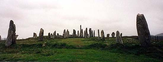 Steinkreise von Callanish (Isle of Lewis)